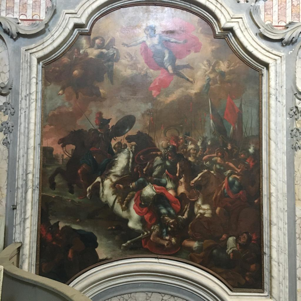 Dipinto di Domenico Carella raffigurante la battaglia di Lepanto, a cui parteciparono anche dei francavillesi. Si trova a destra dell'altare maggiore della basilica minore del Santissimo Rosario (chiesa matrice di Francavilla Fontana) ed è stato fotografato dal coro al di sopra dell'altare.